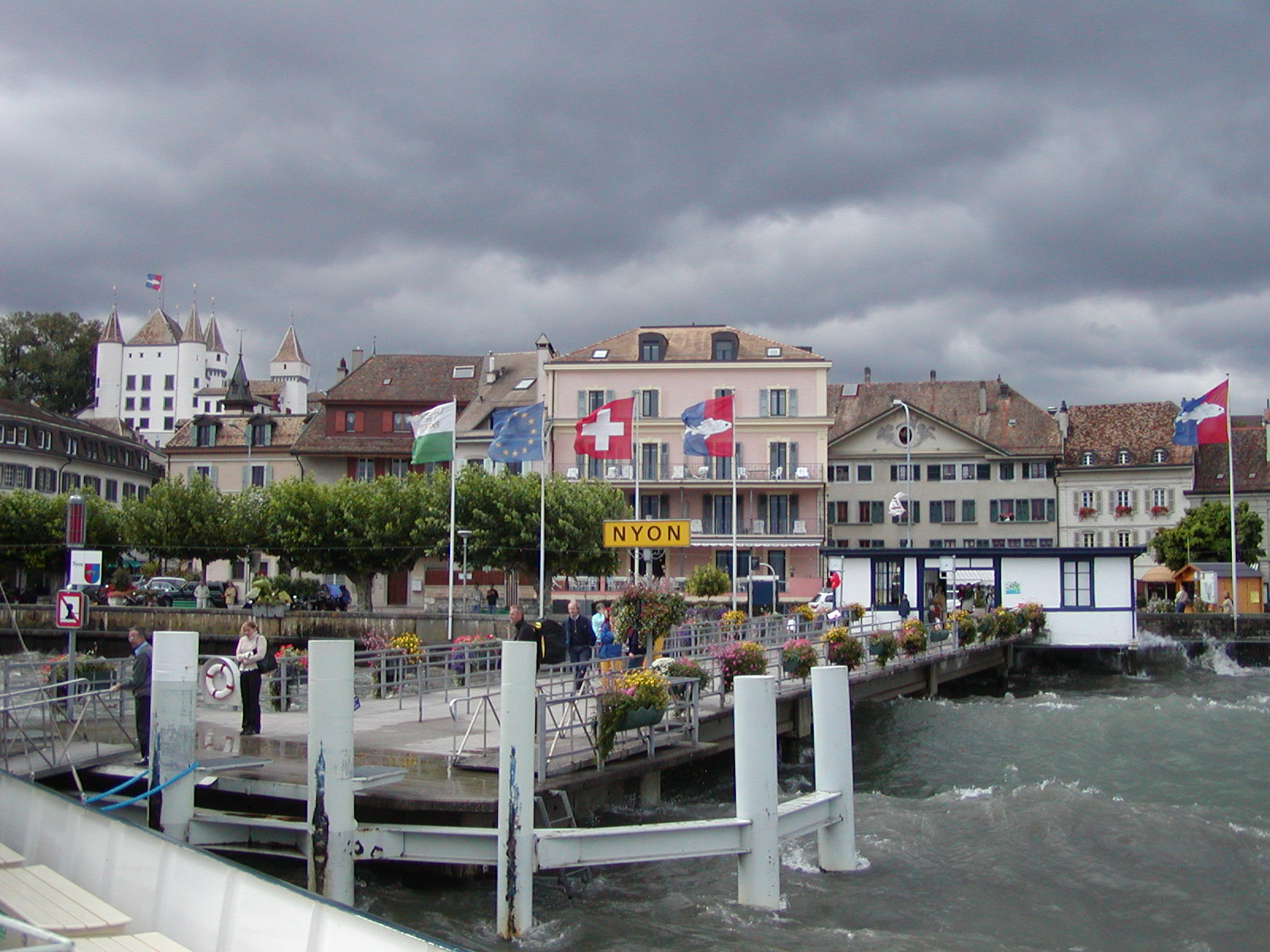 Nyon, Switzerland seen from boat dock in Lake Geneva